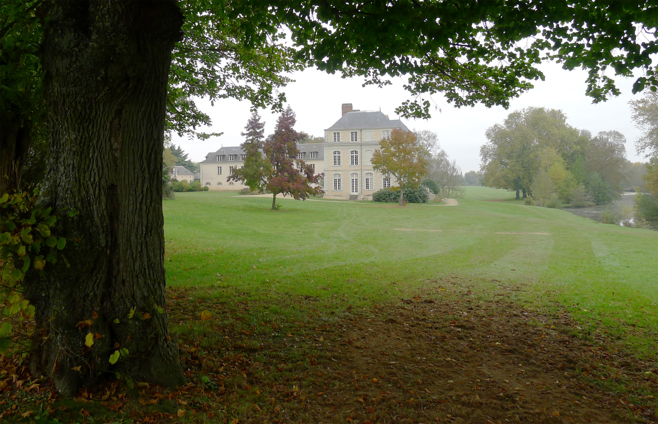 Haras national du Lion-d'Angers - Maine-et-Loire (France)